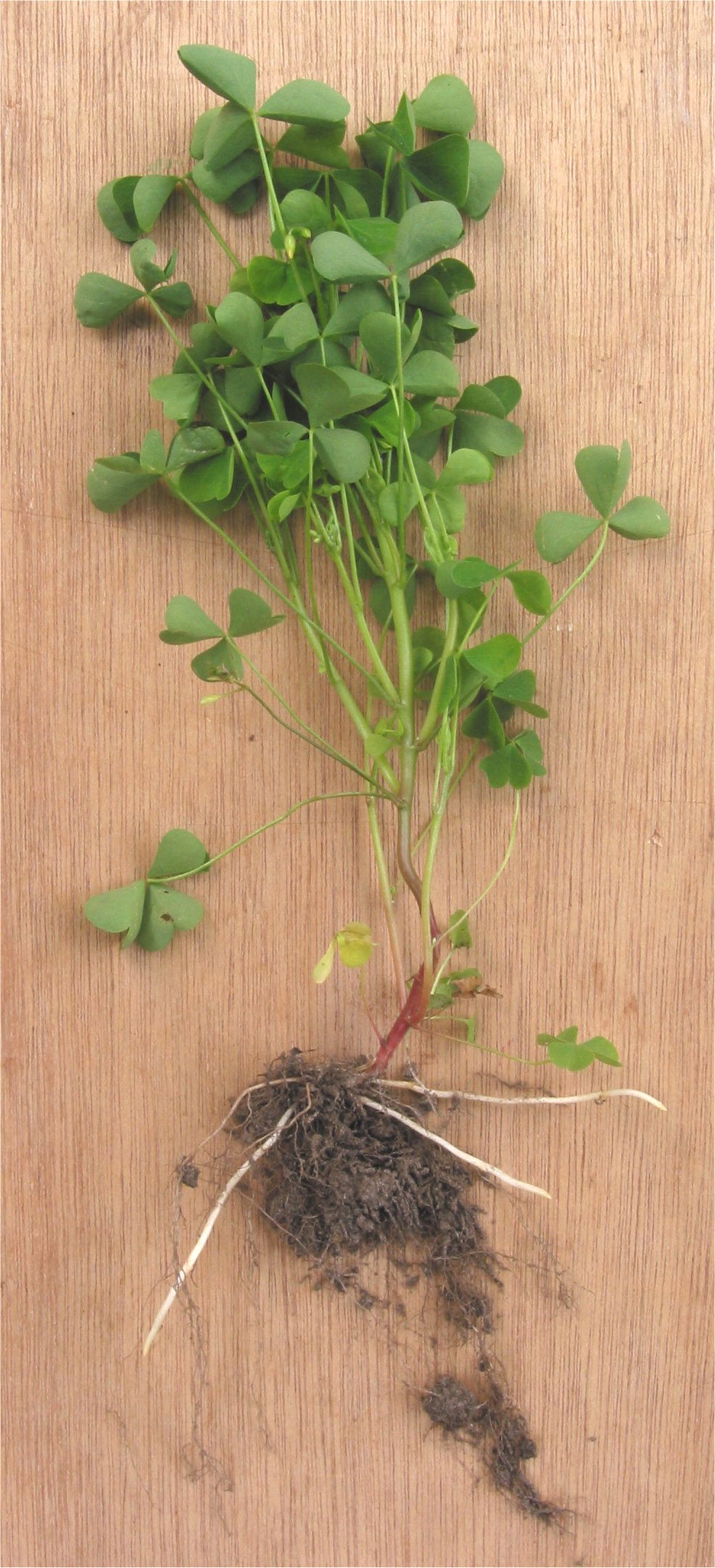 (Stijve klaverzuring uitlopers) Oxalis fontana rhizomes